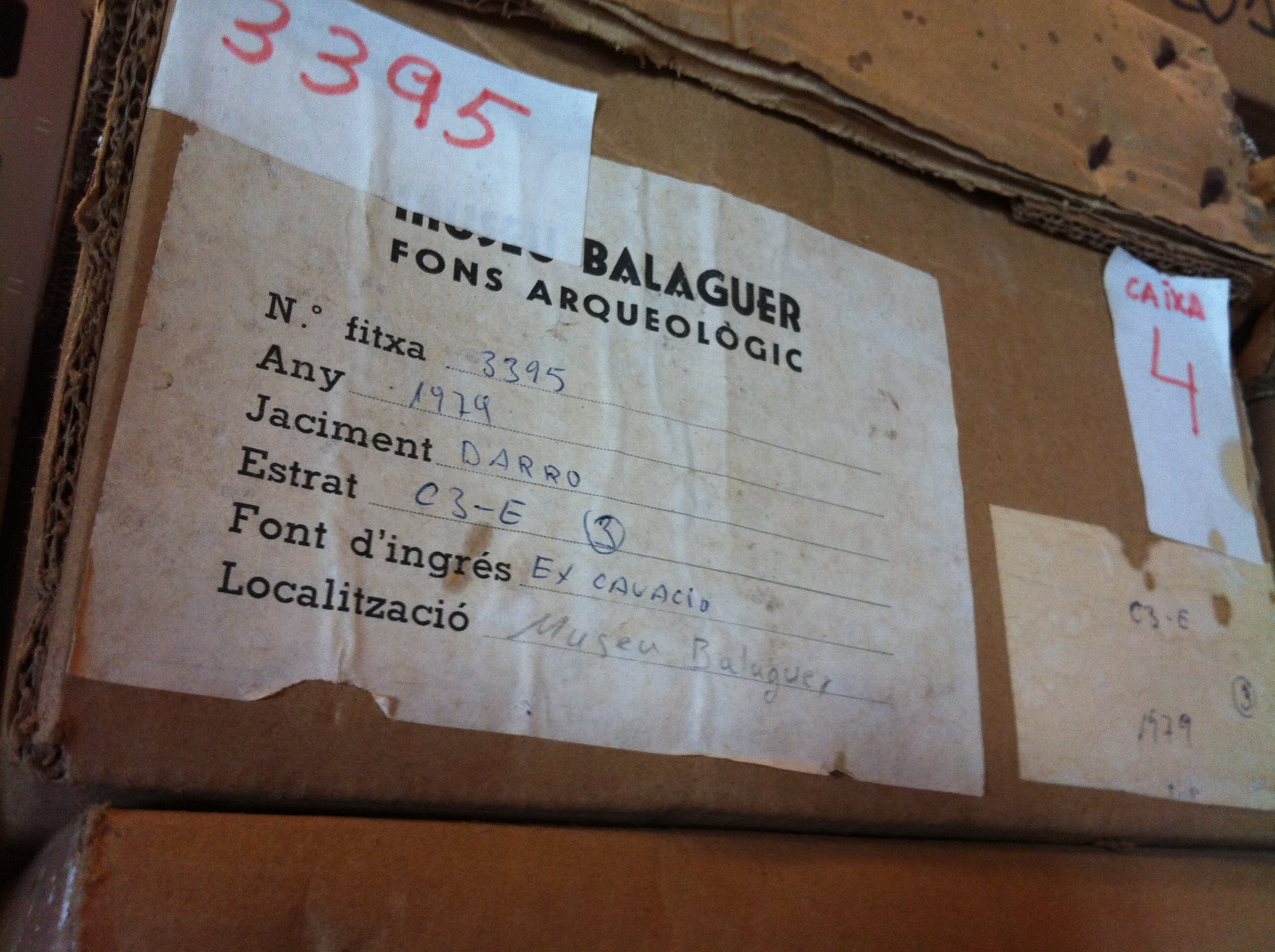 Museu Romàntic Can Papiol. Maig 2014